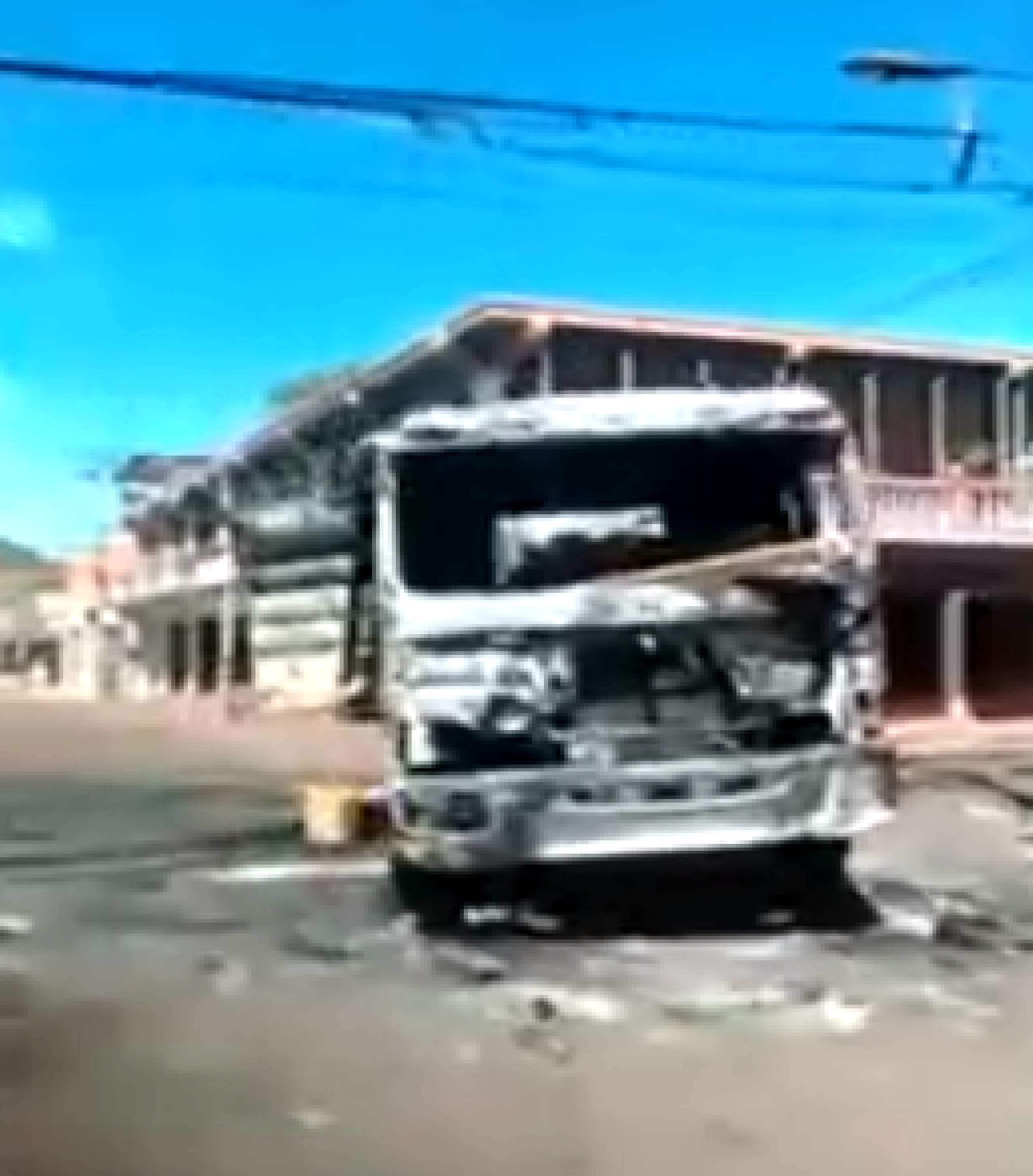 Destrucción de Santa Elena durante la ayuda humanitaria en Venezuela por los enfrentamientos entre el pueblo y el gobierno.